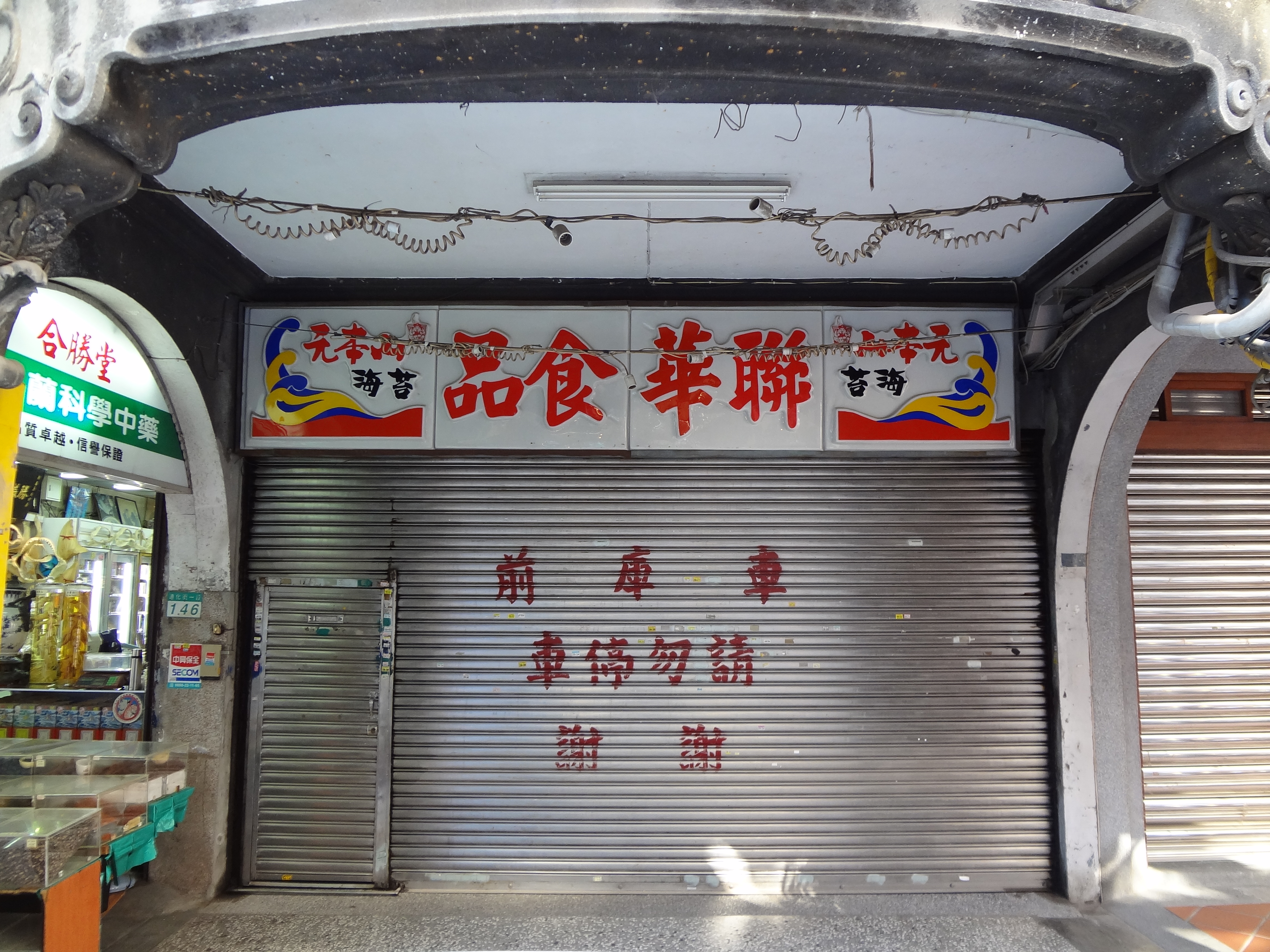 中文（台灣）: 聯華食品總部，地址：臺北市大同區迪化街一段148號。